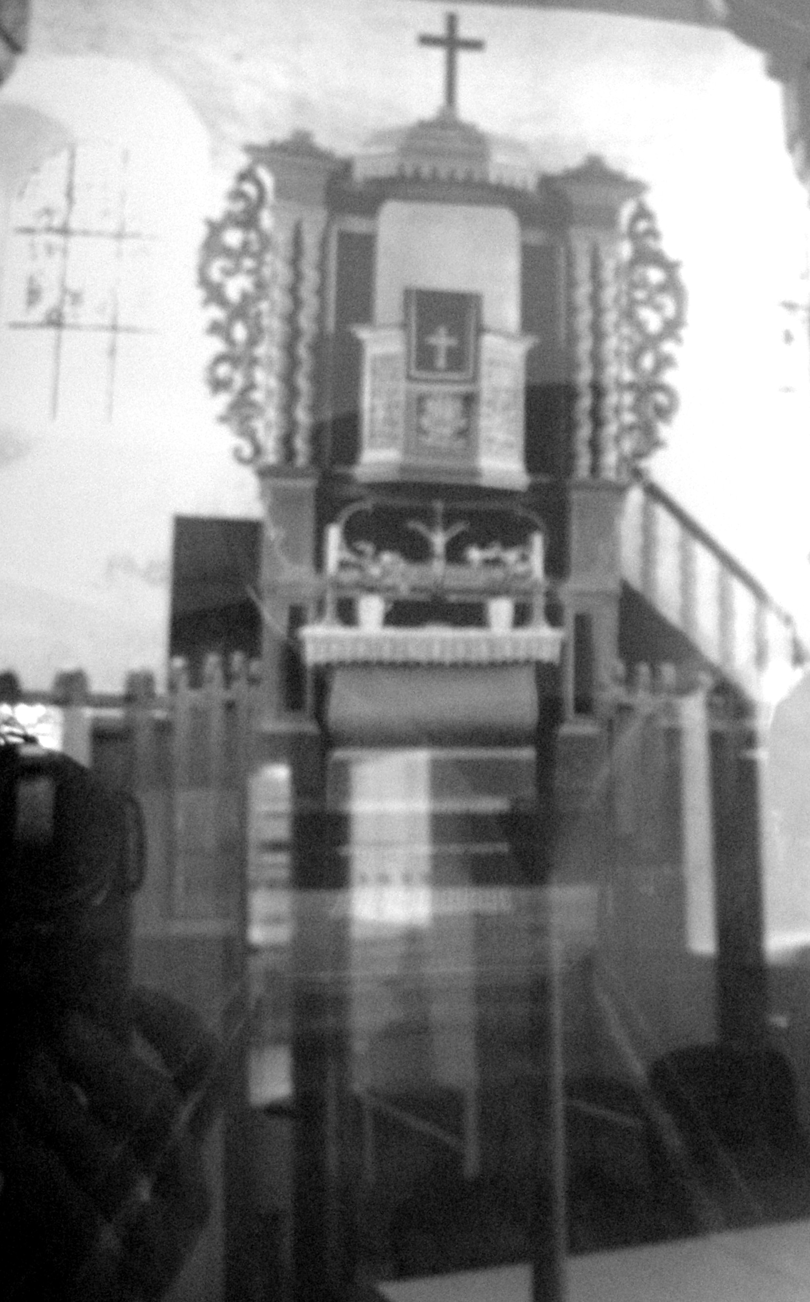 Falkenhagener Dorfkirche, histor. Kanzelaltar